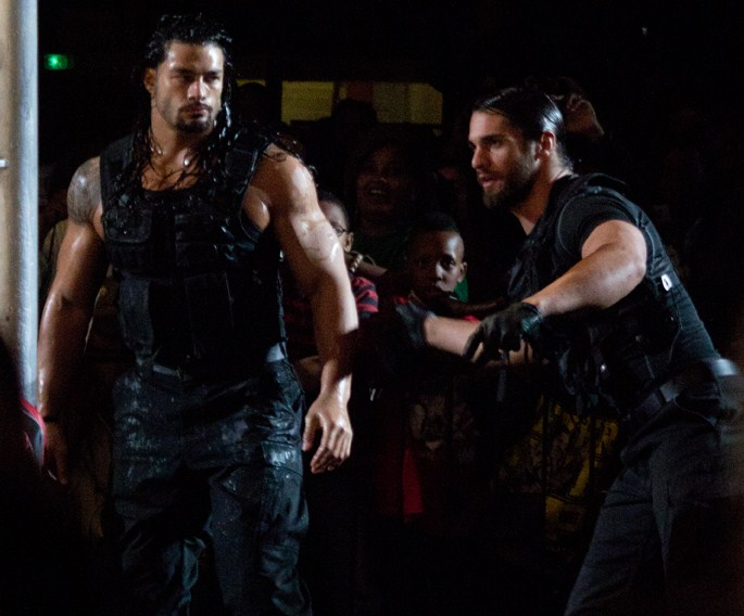 Roman Reigns Shield.